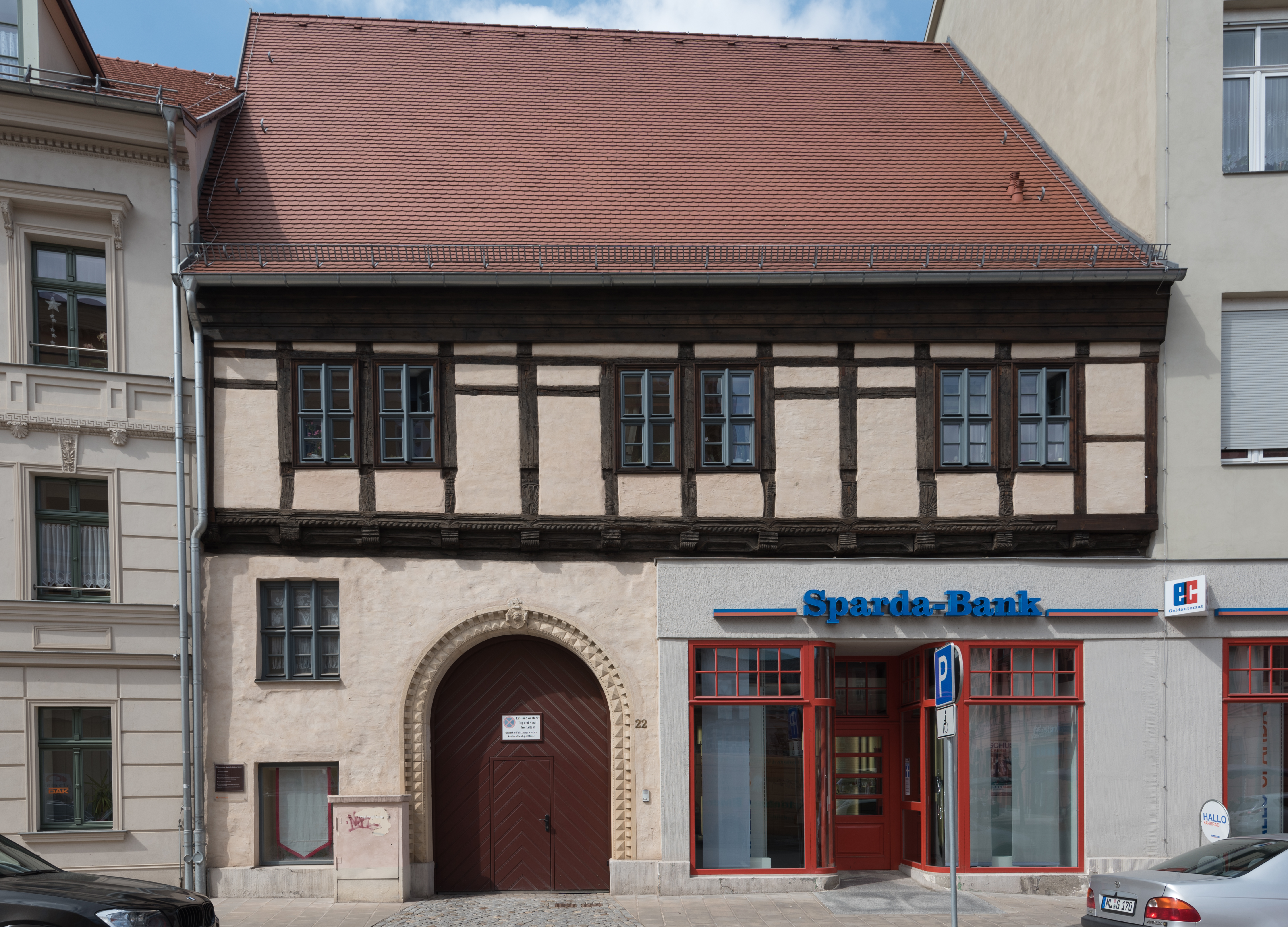 Aschersleben, Tie 22